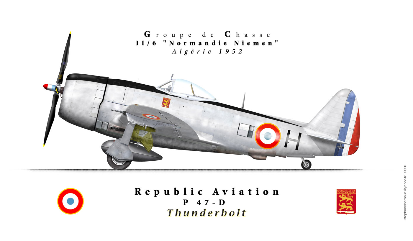 P 47 D Groupe de chasse II/6 normandie niemen Algérie 1952